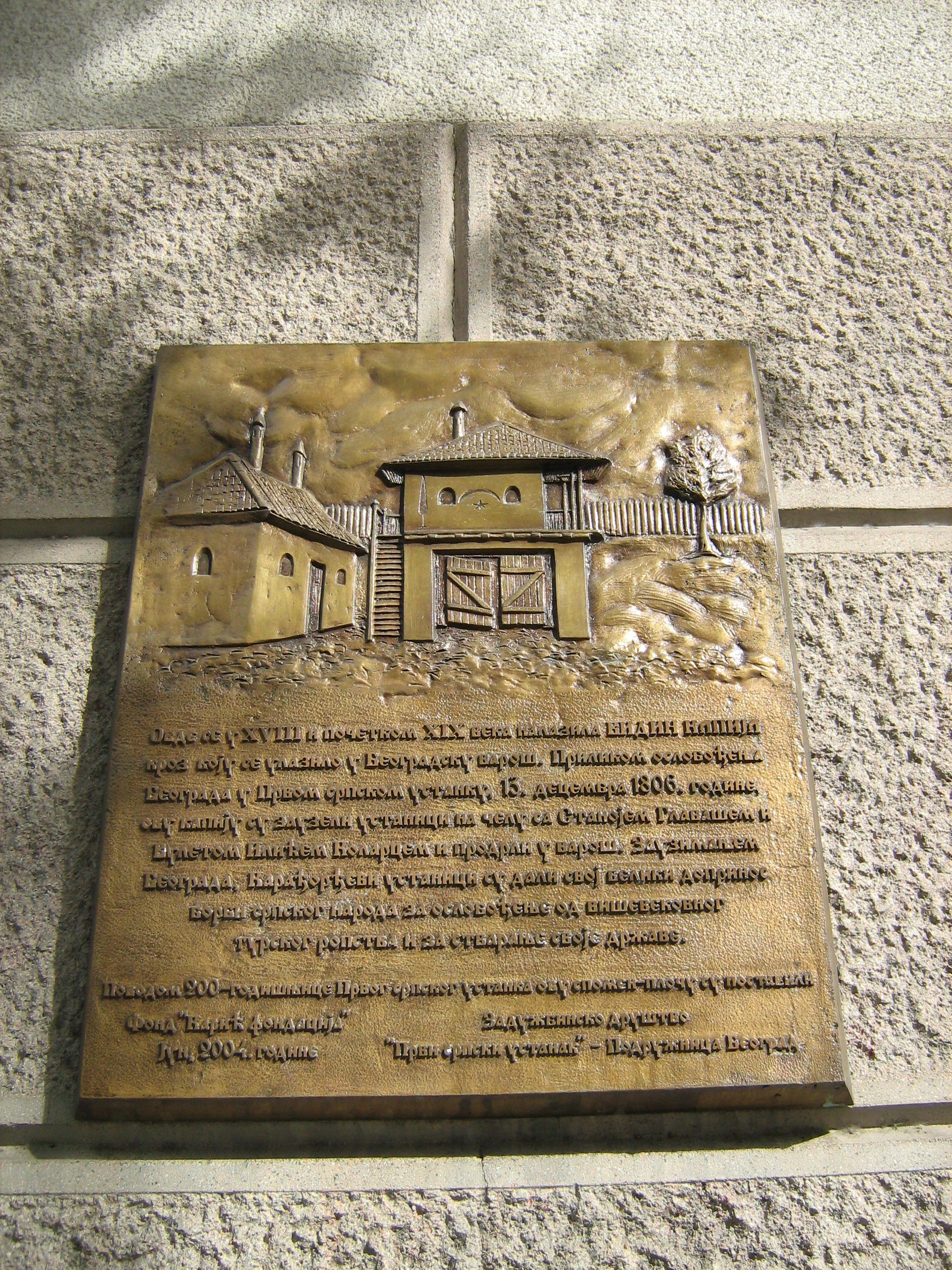 Видин капија - спомен плоча на Првој београдској гимназији.